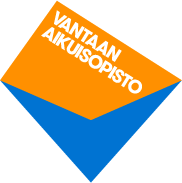 Aikuisopisto logo